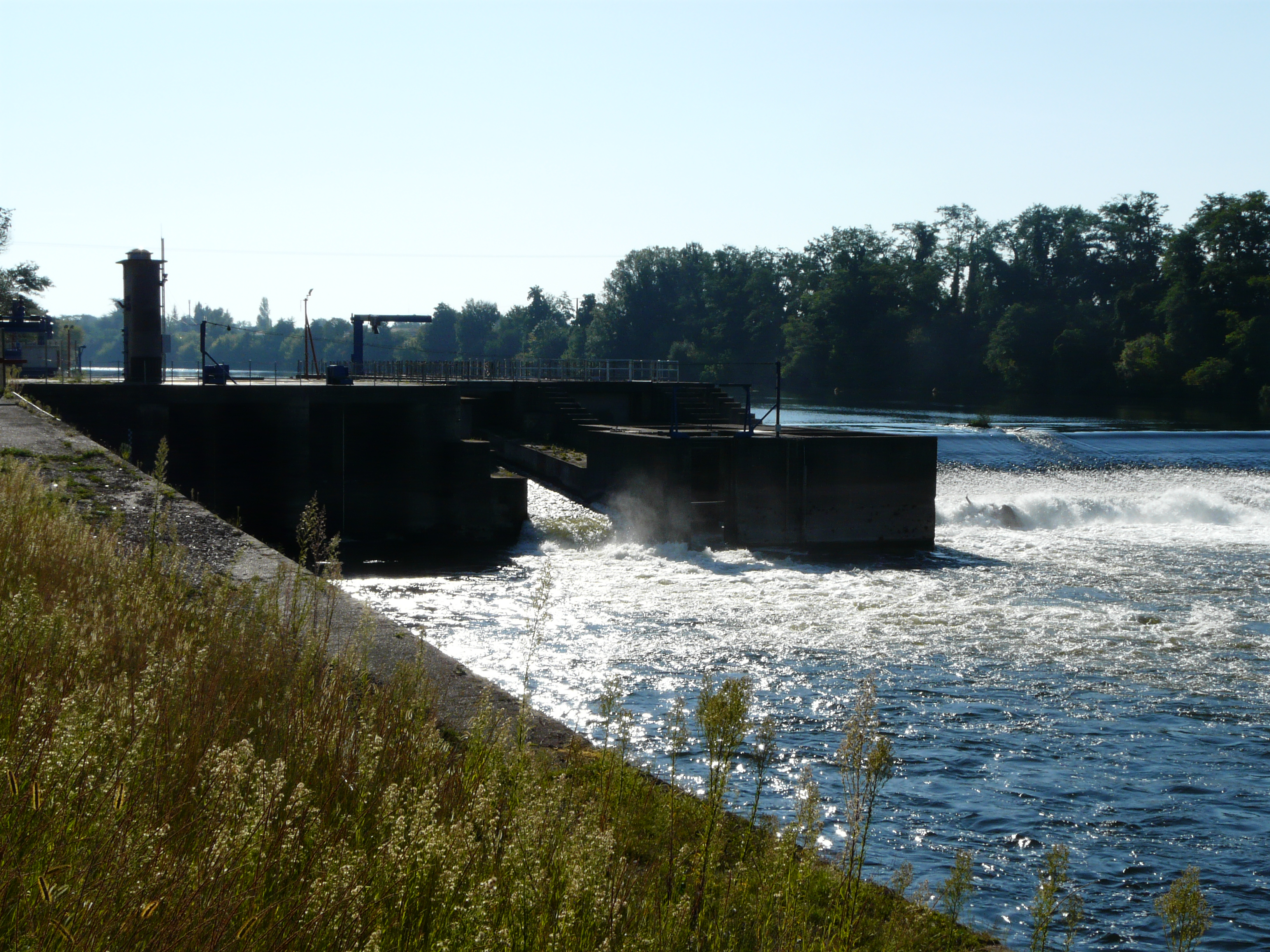 Le barrage de Bergerac sur la Dordogne.